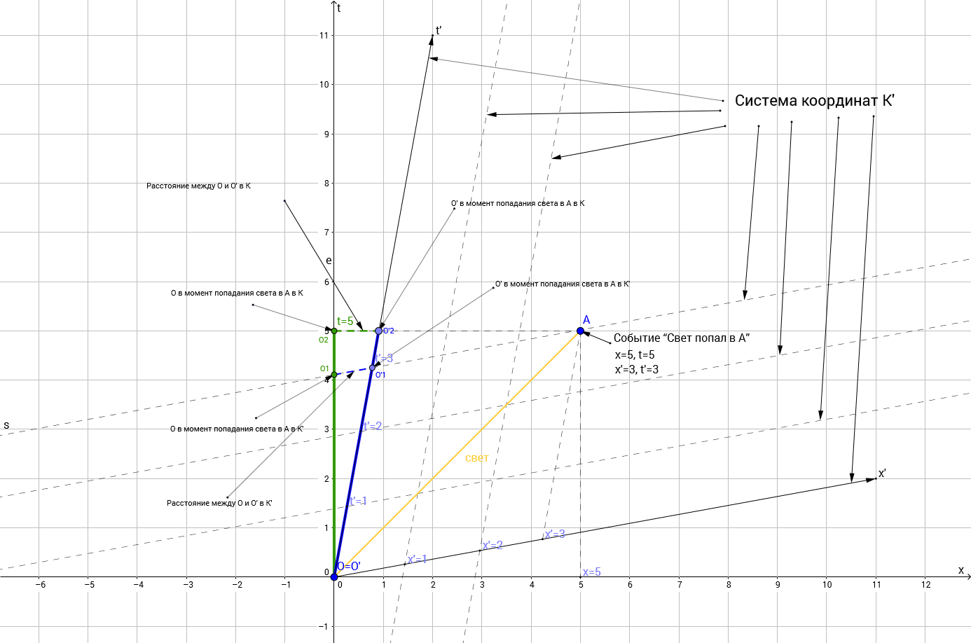 Пространственно-временная диаграмма попадания света в точку А с точки зрения двух систем отсчета.